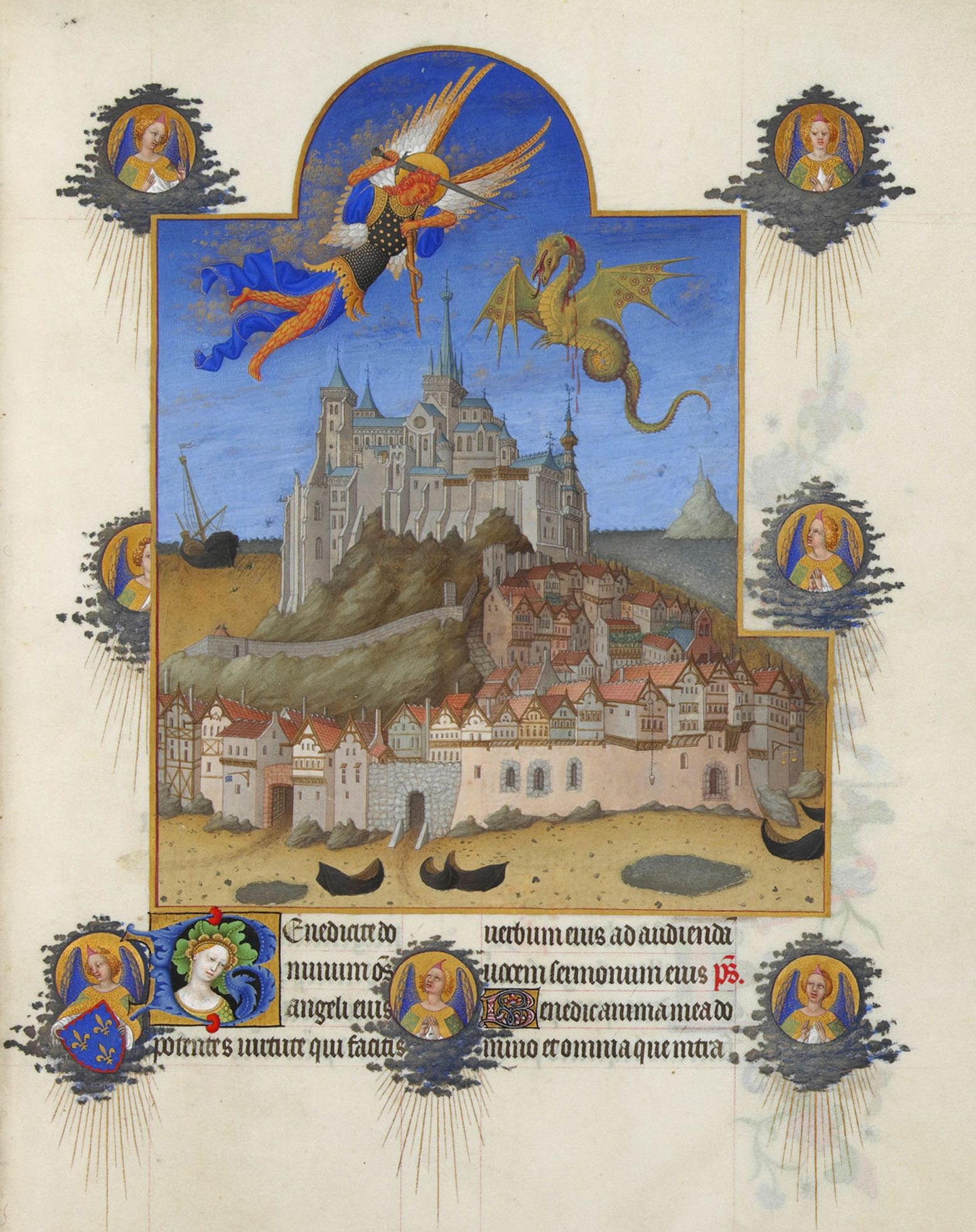 Combat entre l'Archange Saint-Michel et le dragon au dessus du Mont Saint-Michel, à marée basse. Sept anges entourent la miniature et observent la scène dans des médaillons entourés de nuages argentés. L'un d'entre eux, en bas à gauche, tient l'écu du duc de Berry